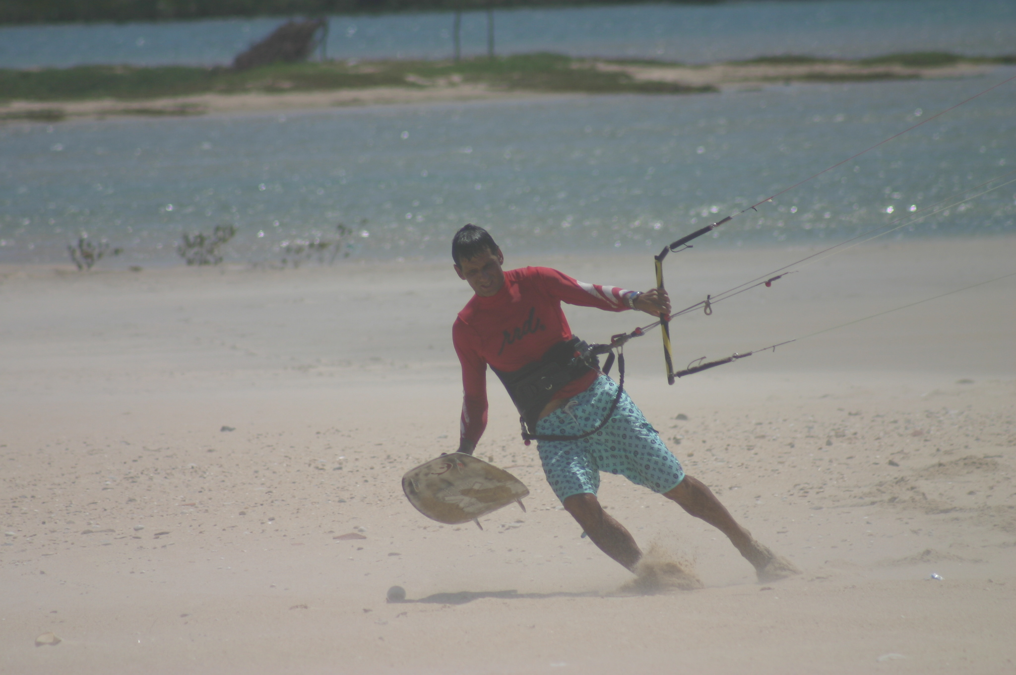 paracuru brasile ceara